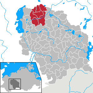 Amt Brüel in Mecklenburg-Vorpommern - District Parchim